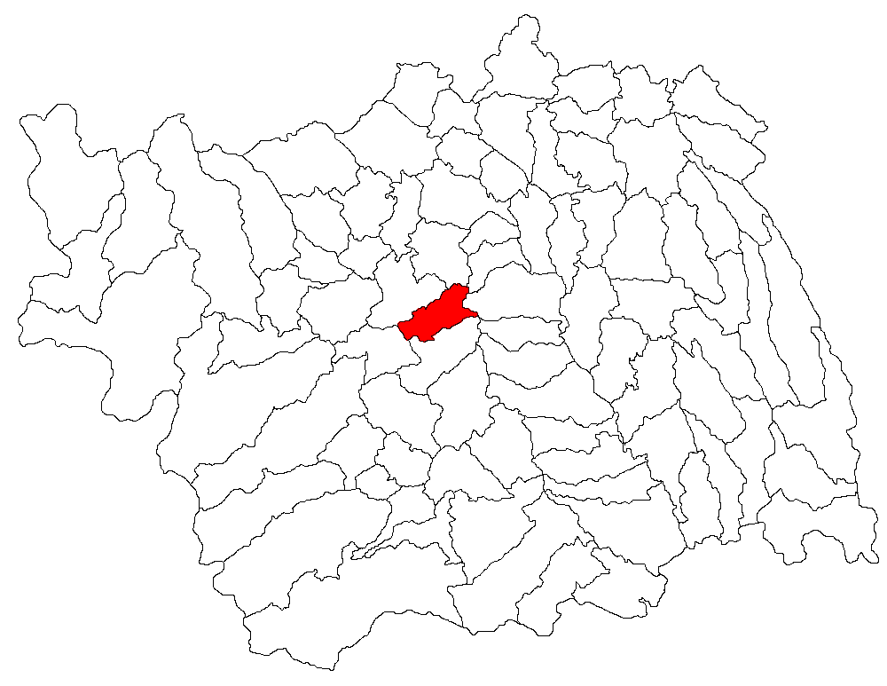 Categorie:Hărţi ale judeţului Bacău